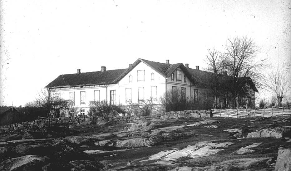 Holleby gods, Sarpsborg.